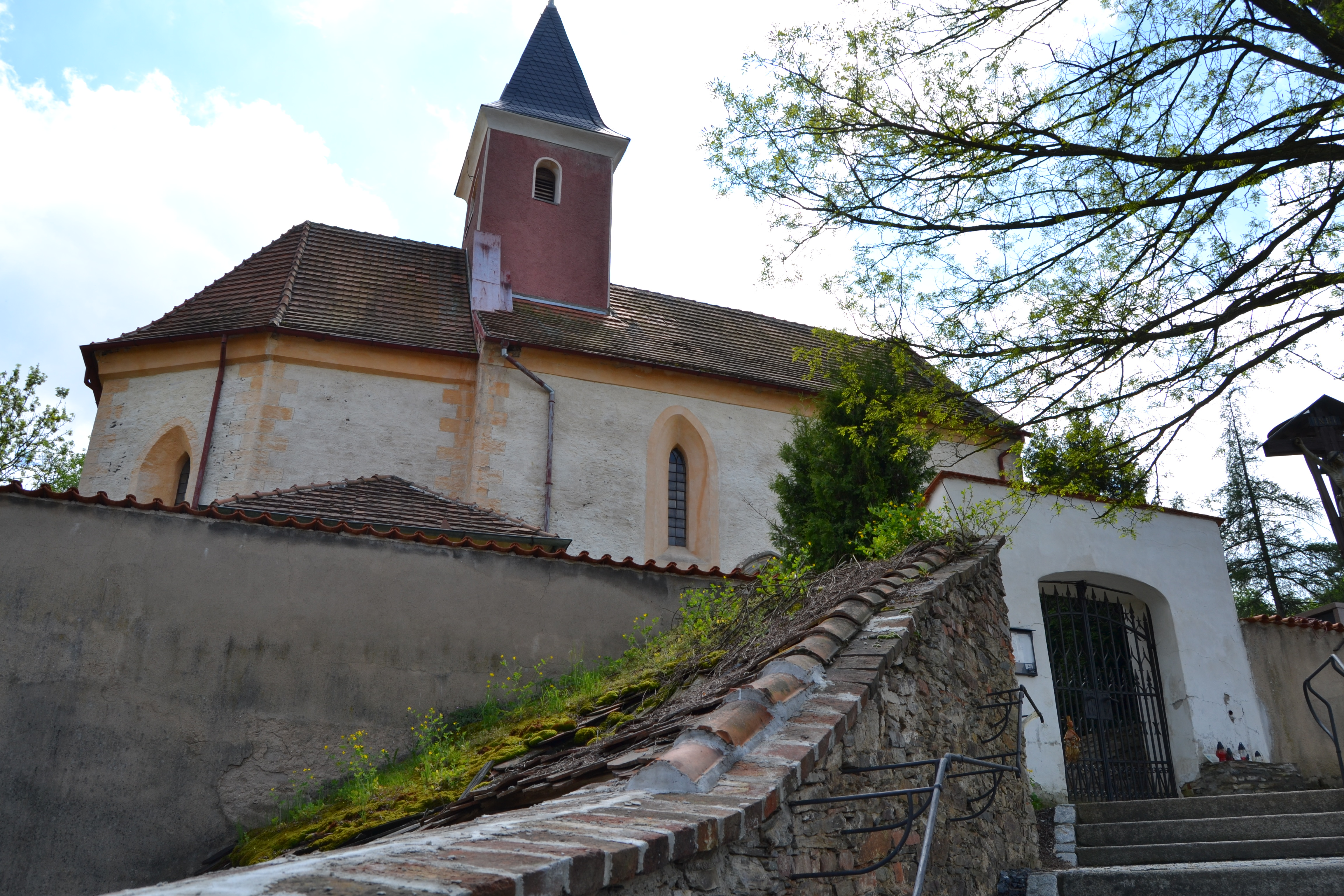 Exteriér kostela v Libři